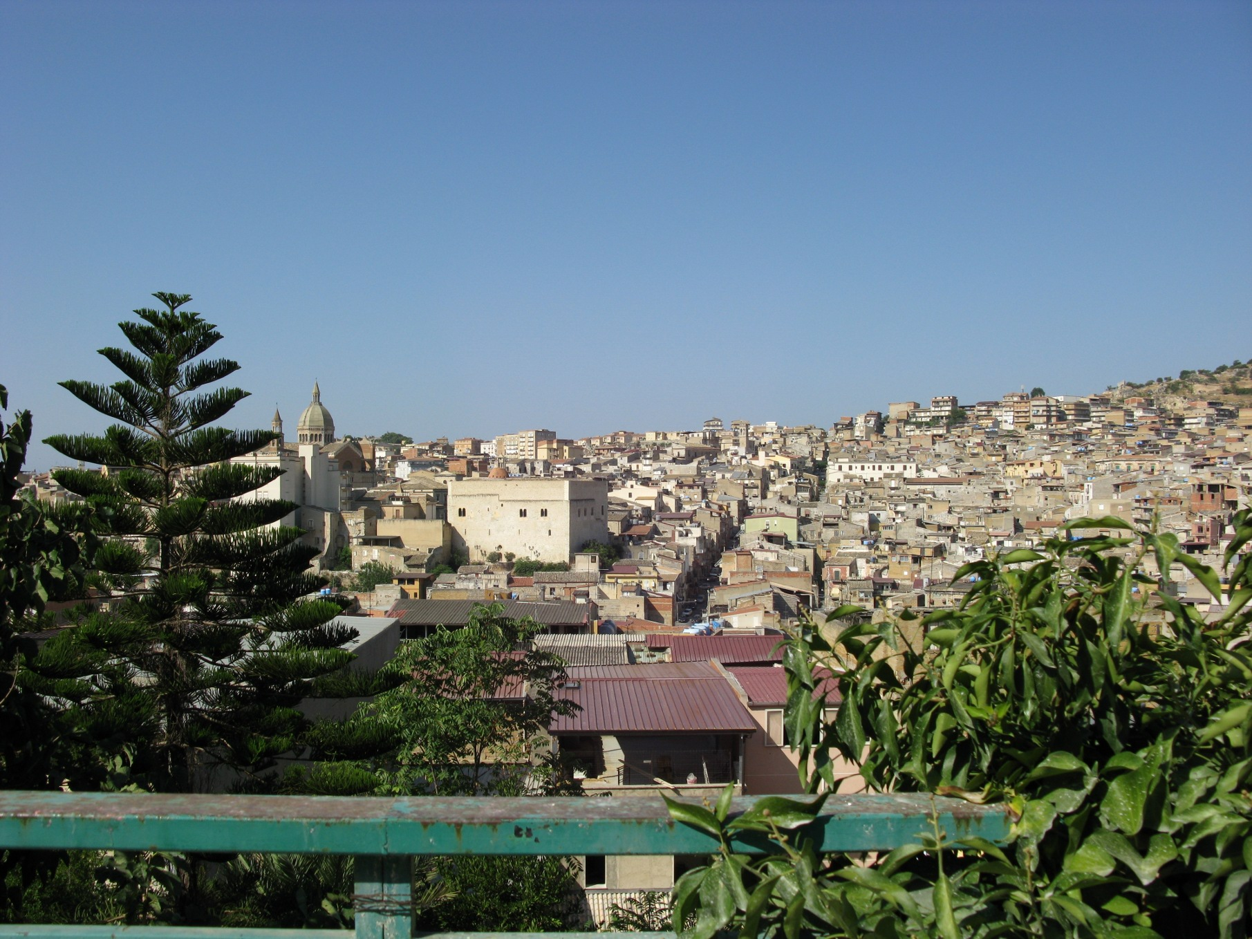 Panorama di Favara visto da San Francesco.